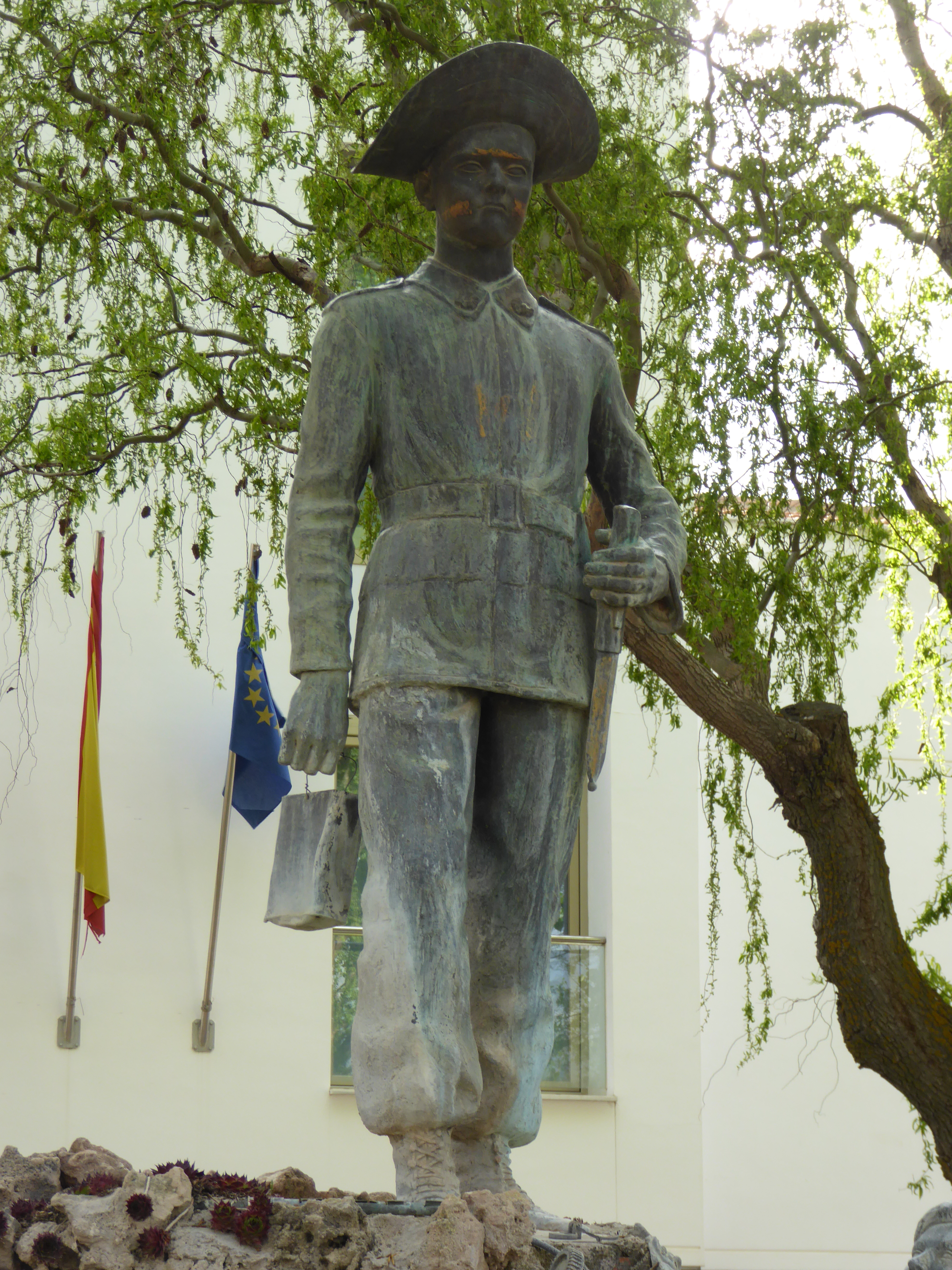 Osa de la Vega